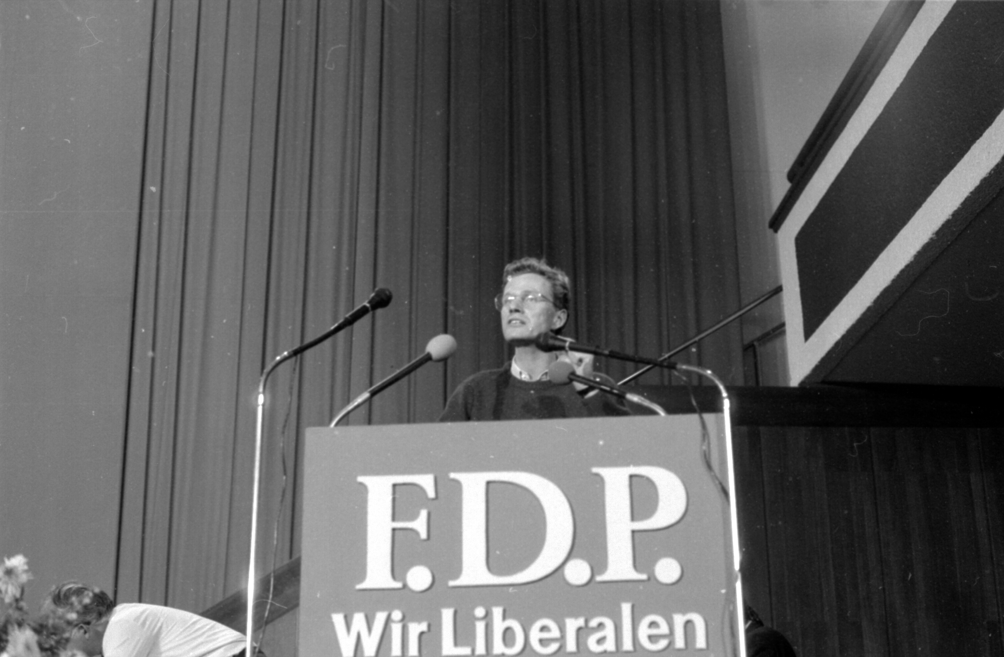 Den außerordentlichen Bundesparteitag Den Bundesparteitag der FDP 1986 hielt die FDP vom 23. bis 25. Mai 1986 in Hannover ab. Es handelte sich um den 37. ordentlichen Bundesparteitag der FDP in der Bundesrepublik Deutschland.